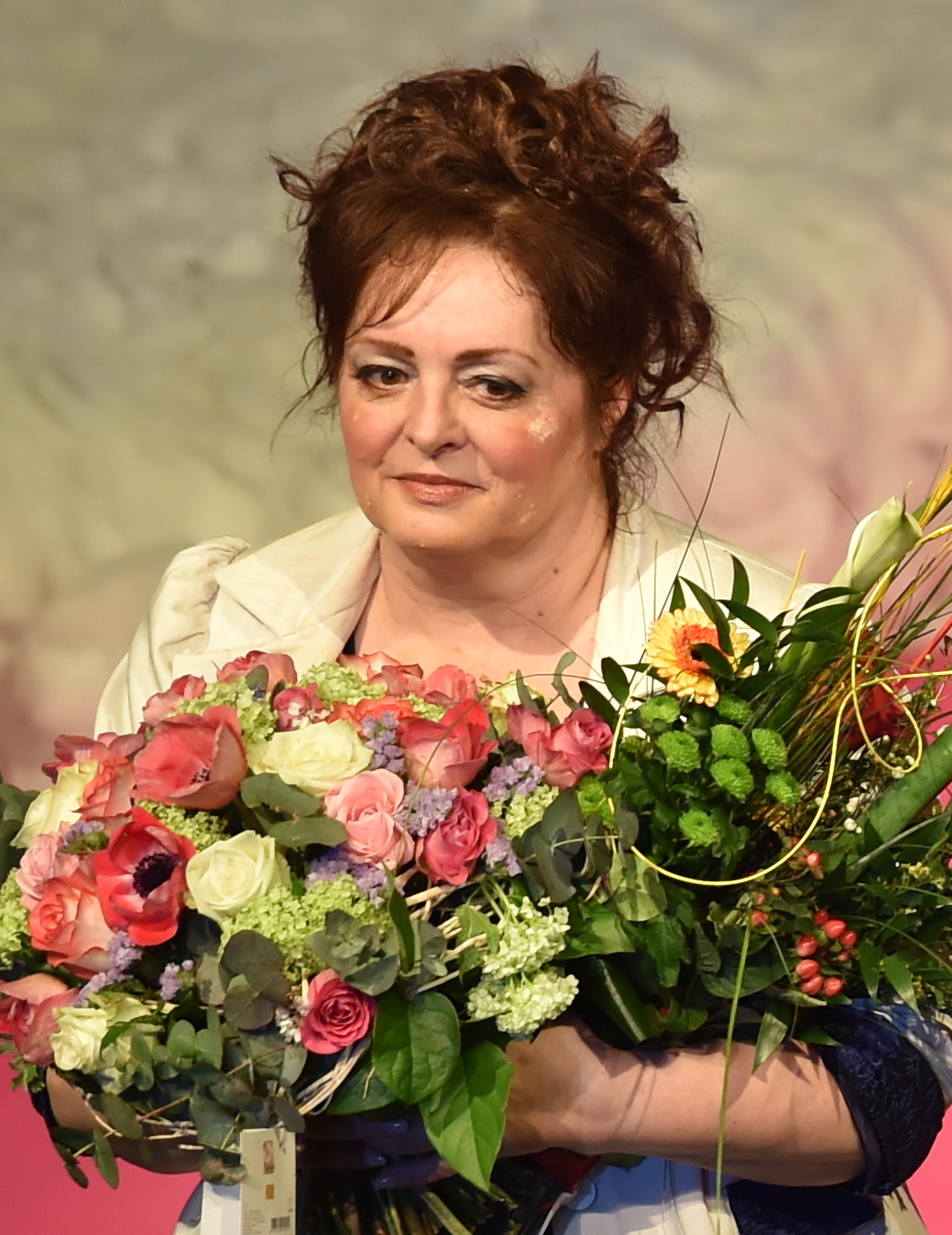 Tatiana Kulíšková